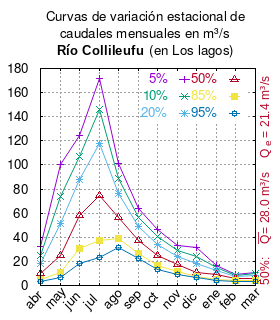 Curvas de variación estacional del río Collileufu en Los Lagos. # Dirección General de Aguas # Diagnóstico y clasificación de los cursos y cuerpos de agua según objetivos de calidad. Cuenca del río Valdivia. # Santiago de Chile # Ministerio de Obras Públicas (Chile) # 2004 # url: # urlarchivo: # Tabla 4.5: Río Collileufú en Los Lagos (m3/s), pág. 49 mes 5% 10% 20% 50% 85% 95% abr 32.10 24.73 18.03 9.86 4.69 3.03 may 100.34 73.96 51.11 25.23 10.57 6.34 jun 124.77 106.75 87.59 57.76 30.59 18.41 jul 171.82 145.75 117.74 74.41 37.74 23.55 ago 101.32 89.09 76.23 56.58 39.20 31.60 sep 63.78 56.75 49.27 37.60 26.95 22.16 oct 46.69 40.67 34.40 24.99 16.86 13.38 nov 33.01 28.81 24.44 17.83 11.95 9.29 dic 31.30 24.09 17.95 11.19 7.51 6.48 ene 16.70 14.66 12.41 8.74 5.32 3.82 feb 9.12 8.37 7.50 5.99 4.44 3.67 mar 11.08 9.72 8.31 6.18 4.28 3.42 This plot was created with Gnuplot.